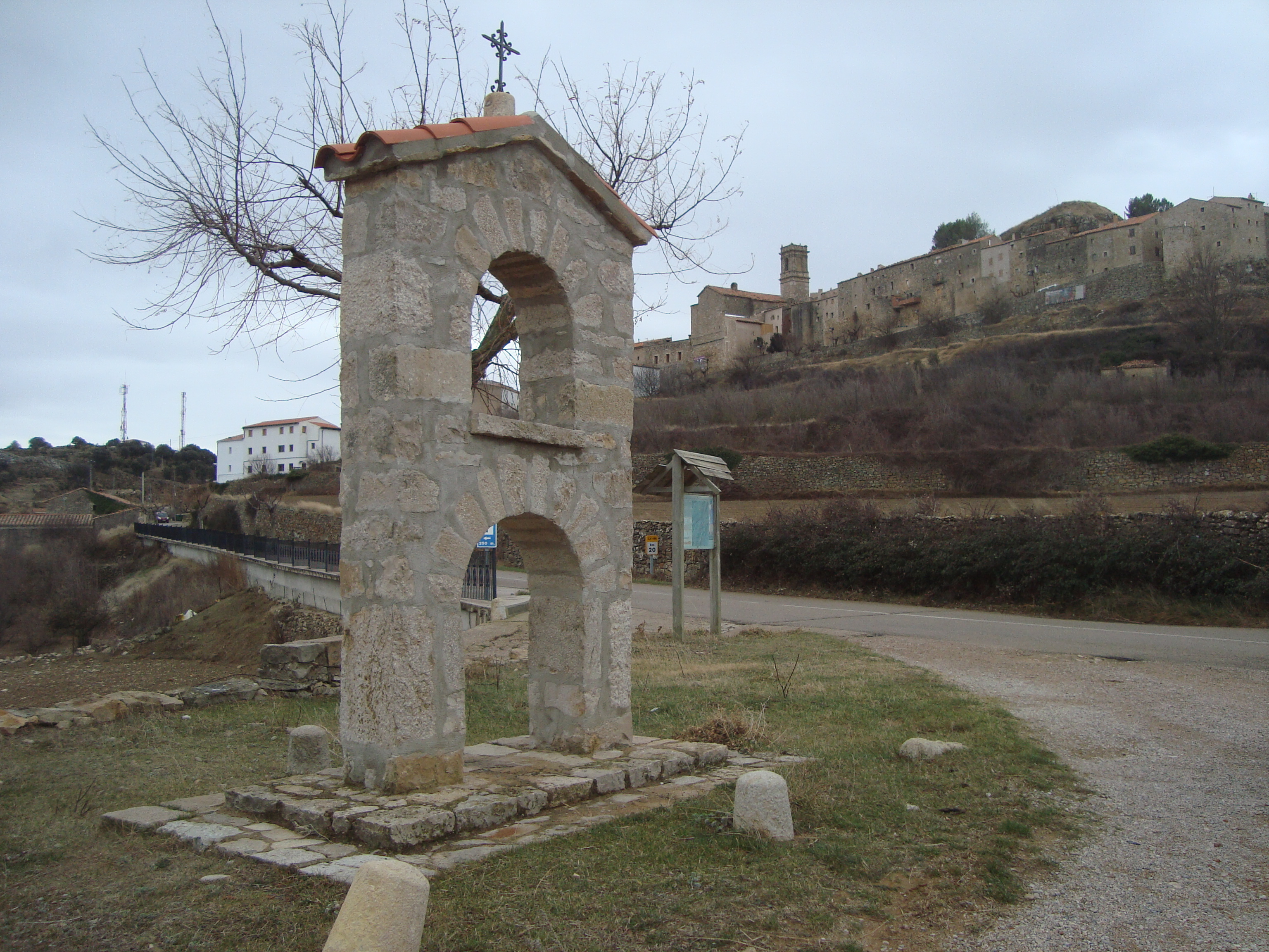 Panorámica de Culla (Alt Maestrat, Castelló)